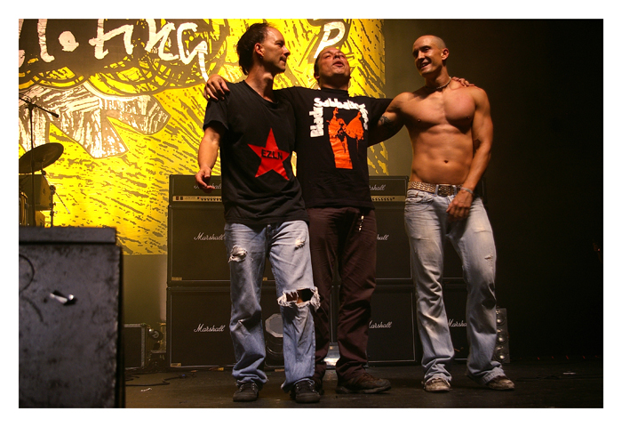 Presentación del Dvd Voltaje en vivo desde el Teatro Metropólitan